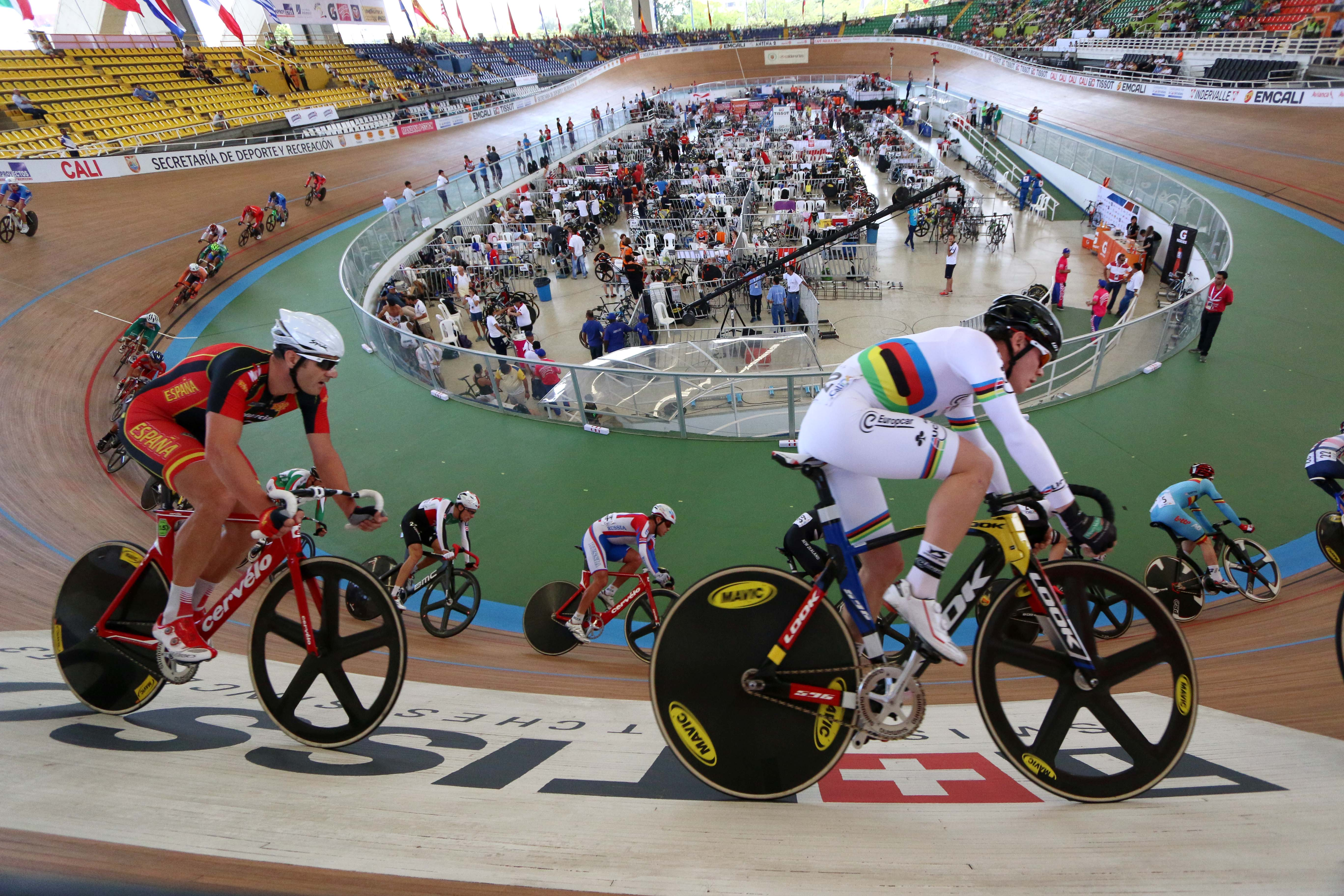 Track Cycling - Campeonato del Mundo de Ciclismo de Pista, Cali 2015.